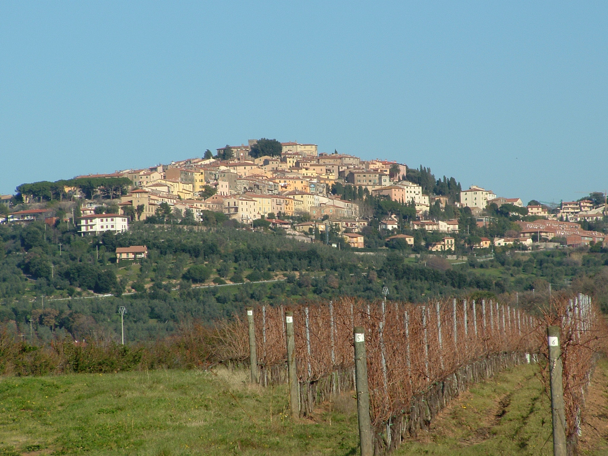 Castagneto Carducci: febbraio 2007